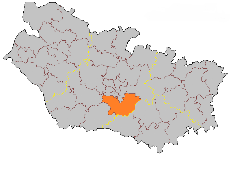 Кантон Бов на карте департамента Сомма